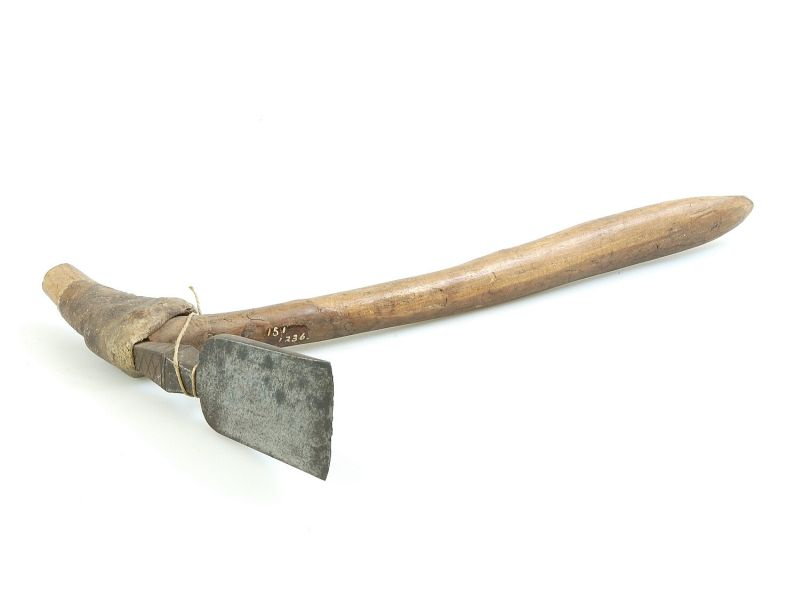 Dissel. Dissel met houten steel